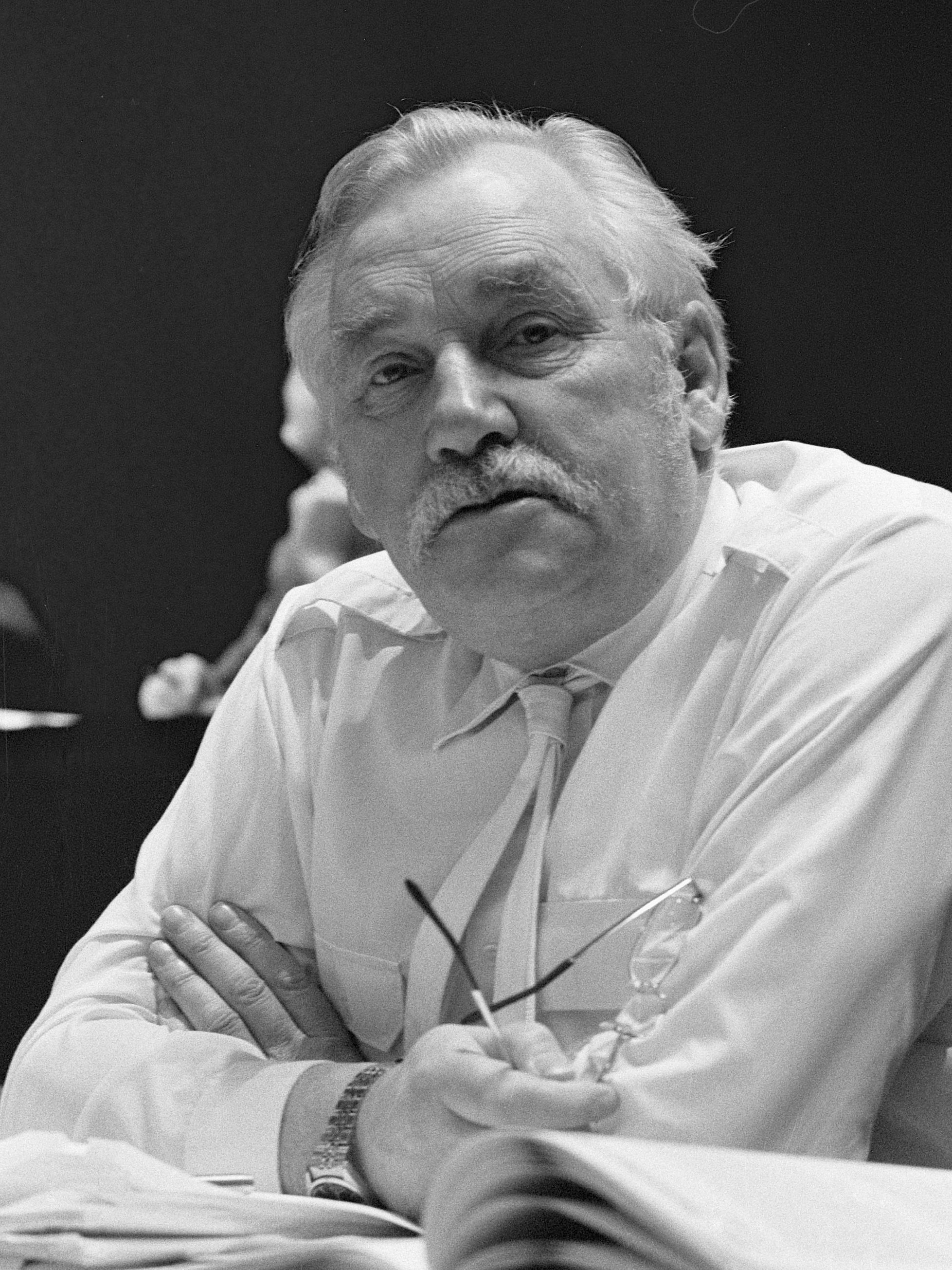 Jaap van der Scheur , voorzitter van ABVA/KABO, congres in Amsterdam 26 maart 1986